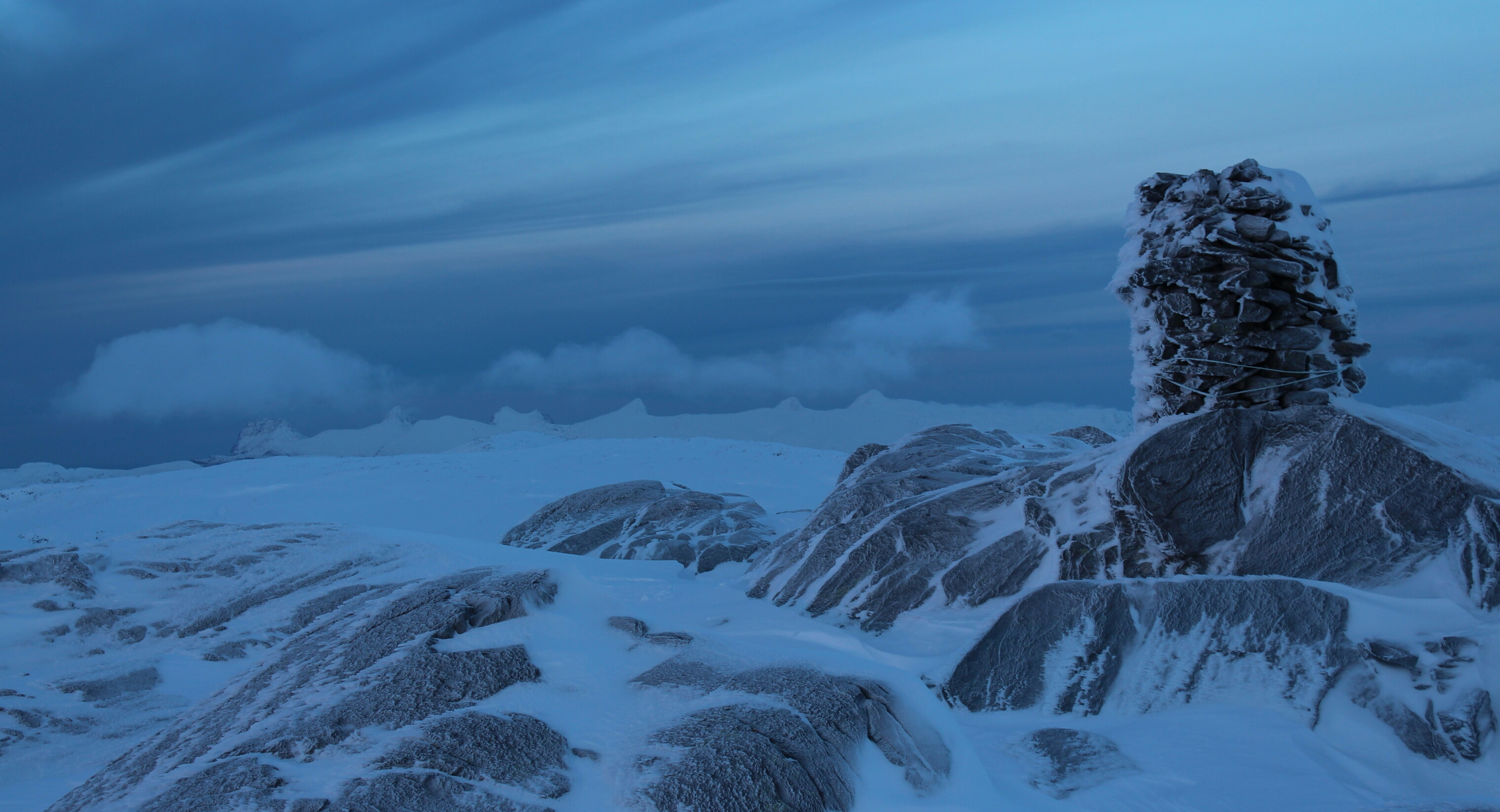 Øyfjellvarden turmål hele året. Også vinterstid.